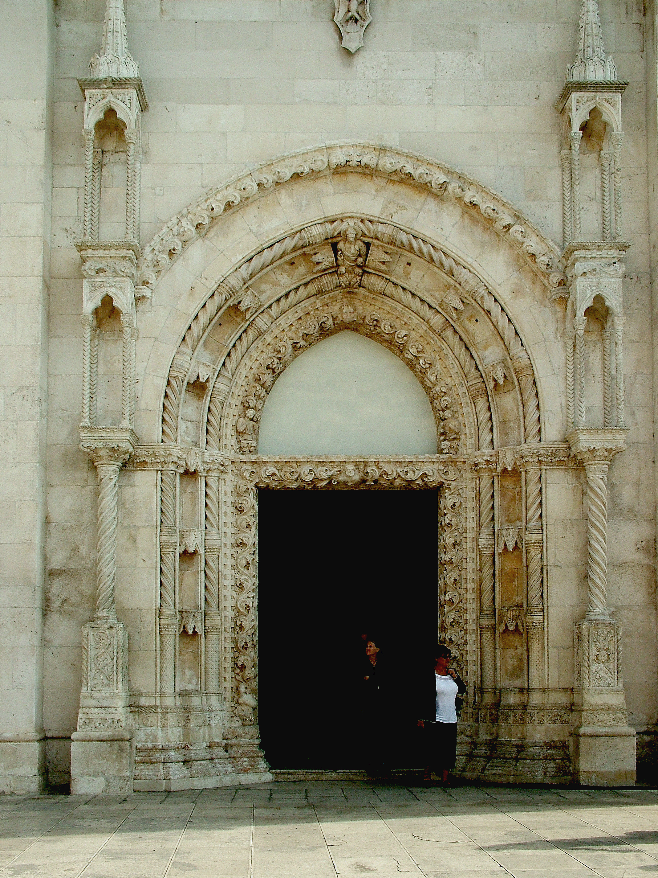 Sibenik, Szt. Jakab templom: Nyugati főkapu (Horvátország)